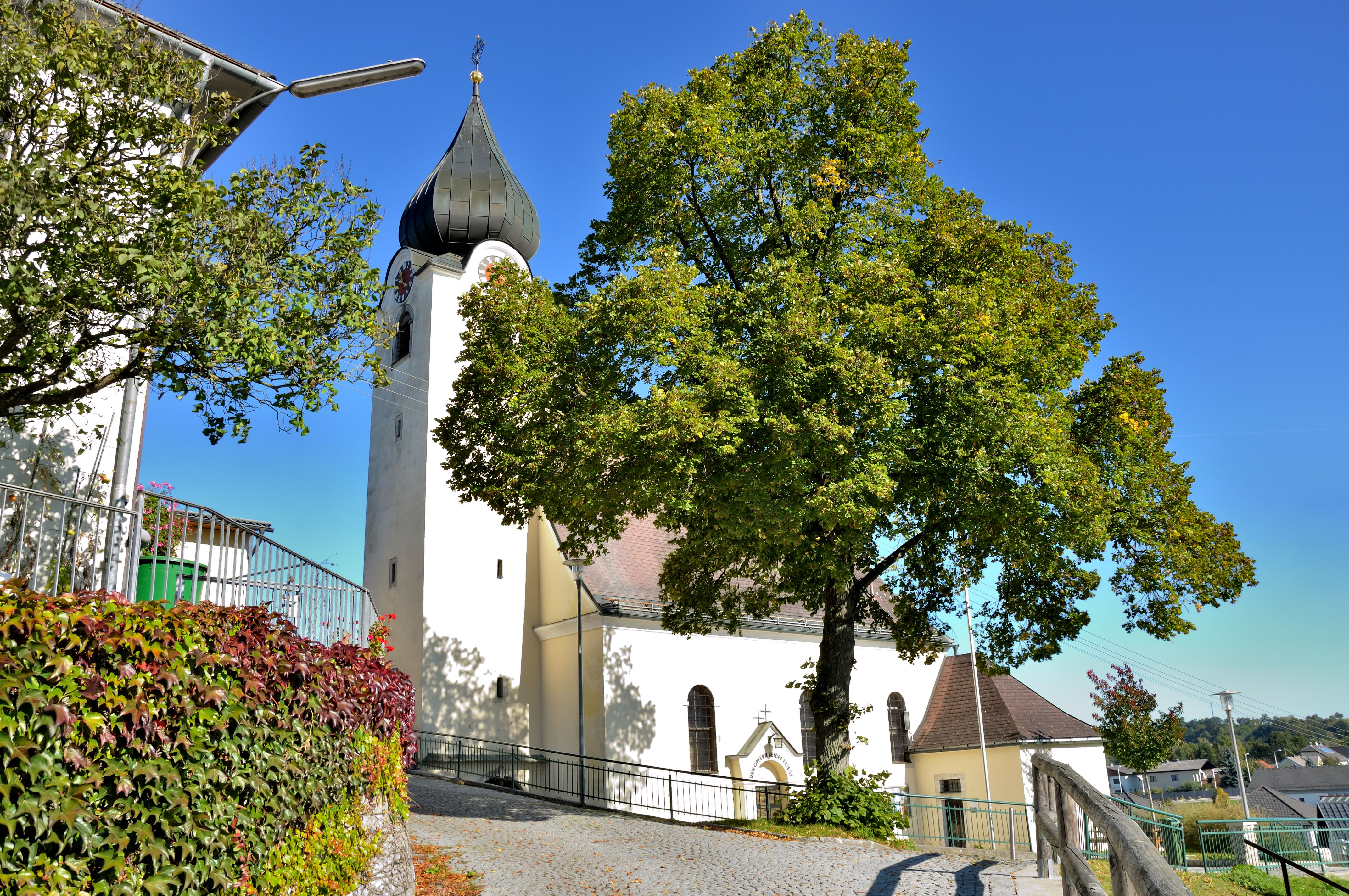 Kath. Pfarrkirche Mariä Himmelfahrt